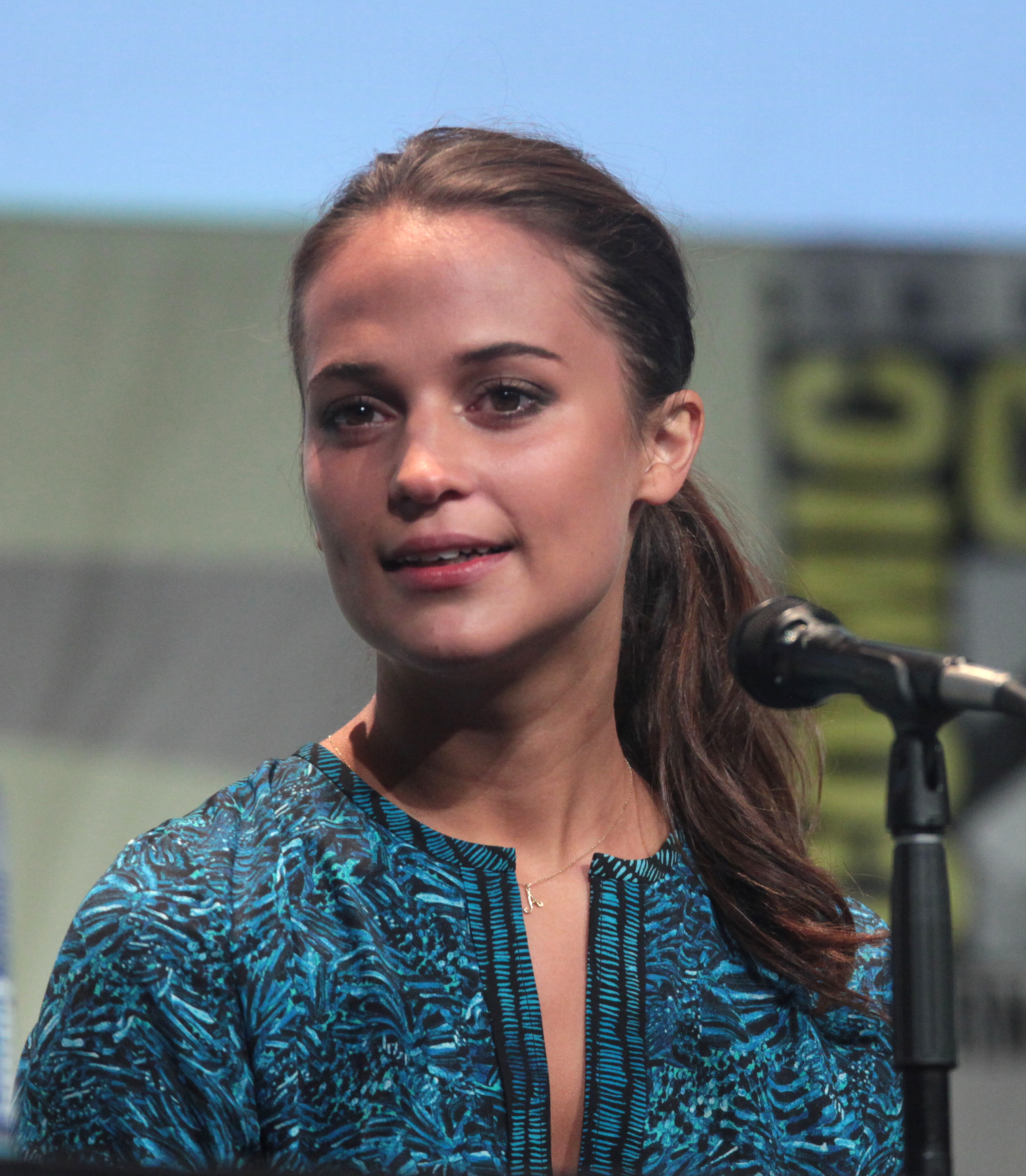 Alicia Vikander em 2015, no San Diego Comic Con International, representando "The Man from U.N.C.L.E.", no San Diego Convention Center em San Diego, Califórnia.